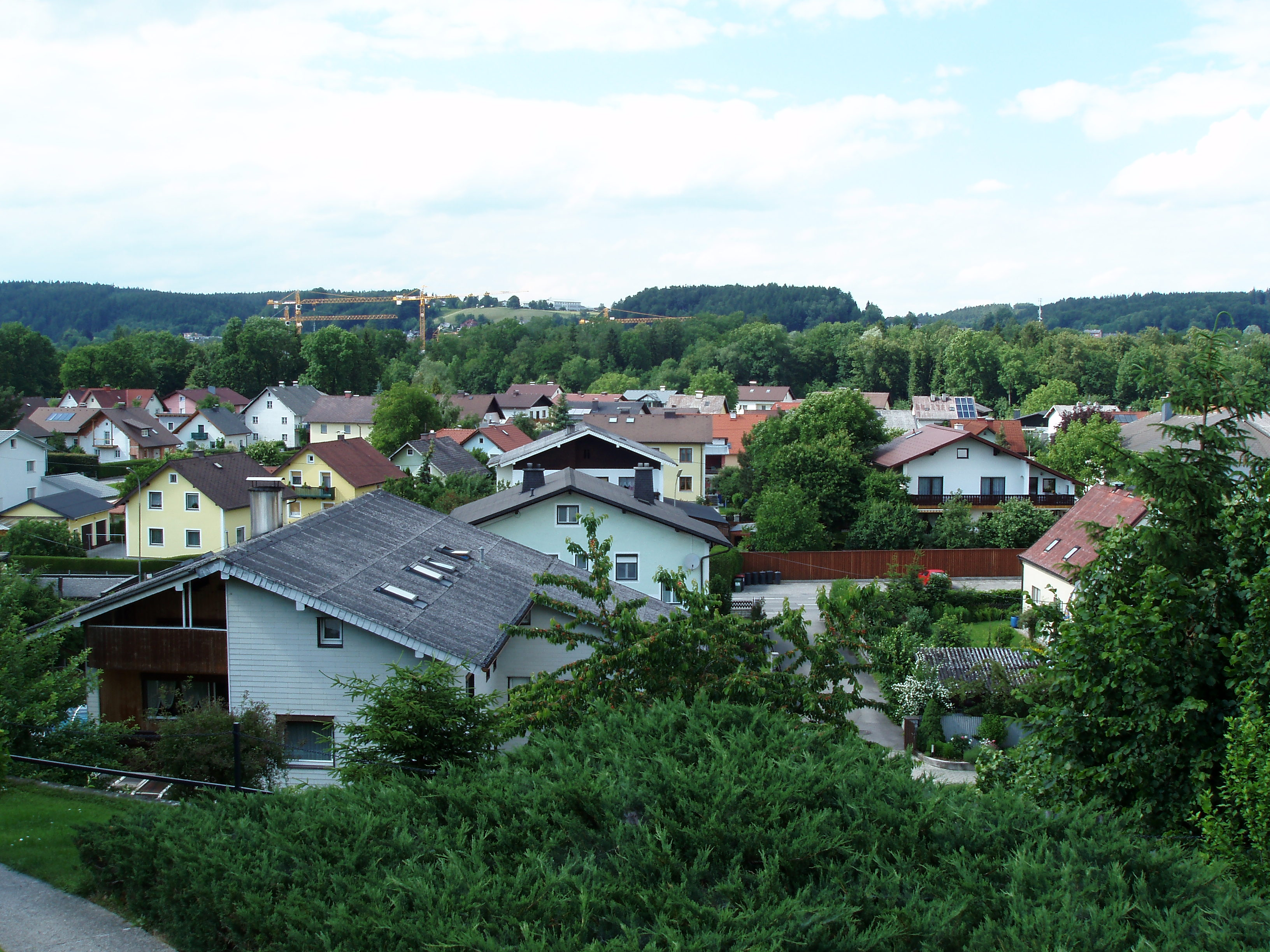 Blick auf Schalchham, Gemeinde Regau, Oberösterreich